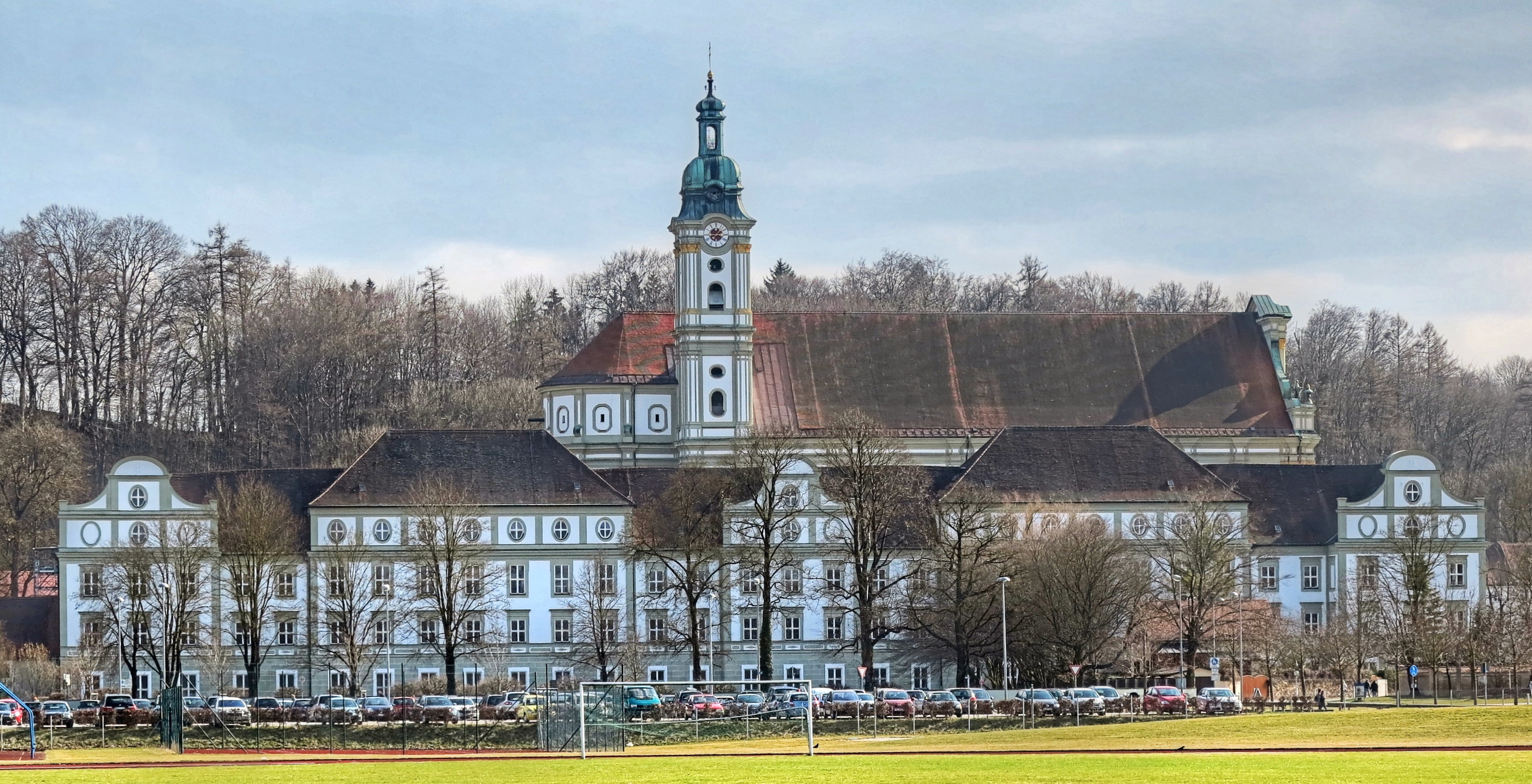 Deutschland, Bayern, Fürstenfeldbruck, Kloster Fürstenfeld